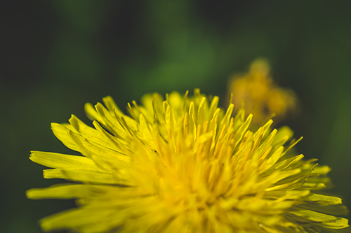 Fotografija žutog maslačka.